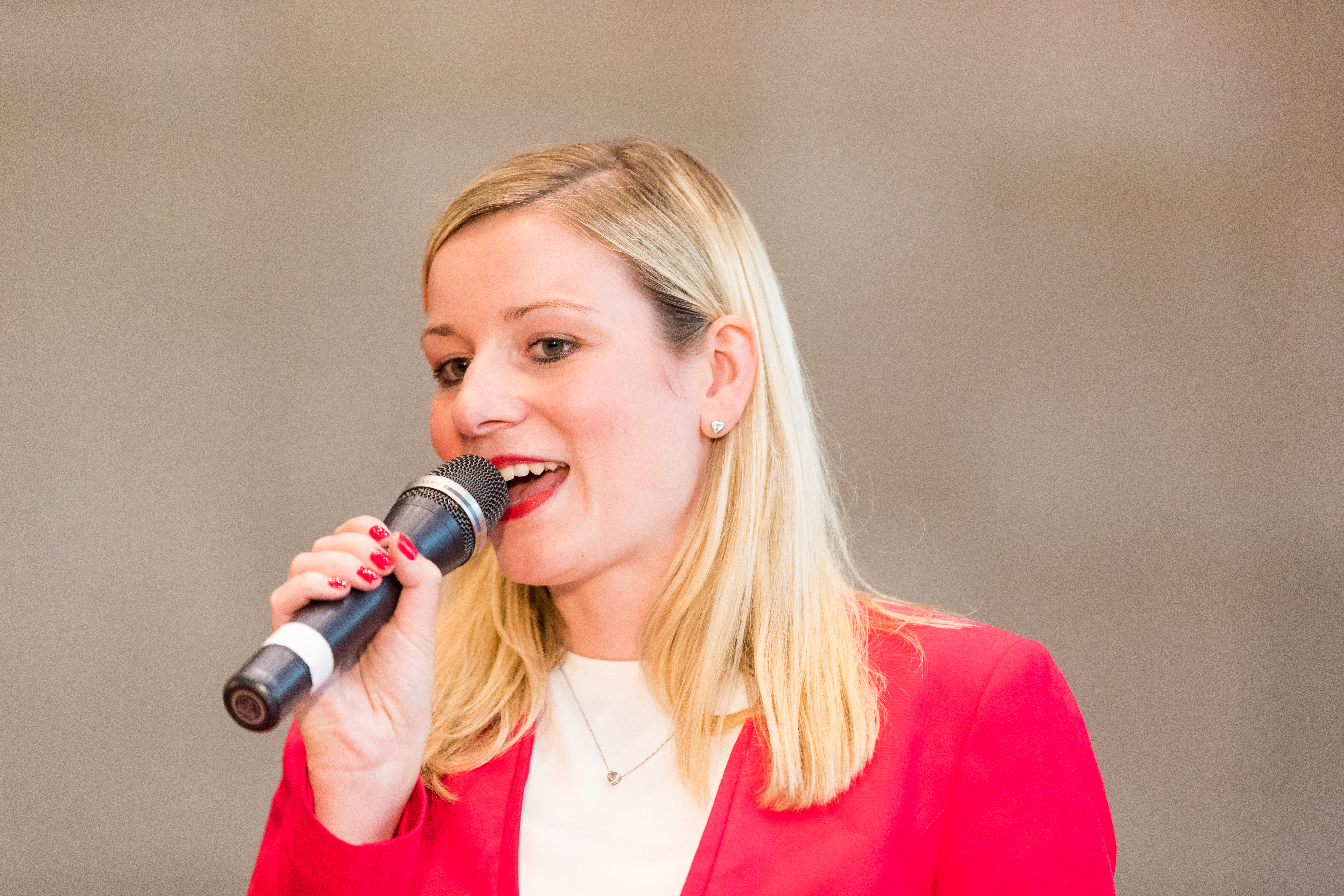 Isabel Mackensen during SPD Wahlkampf Ludwigshafen at Pfalzbau, Ludwigshafen, Rheinland-Pfalz, Germany on 2017-09-13, Photo: Sven Mandel